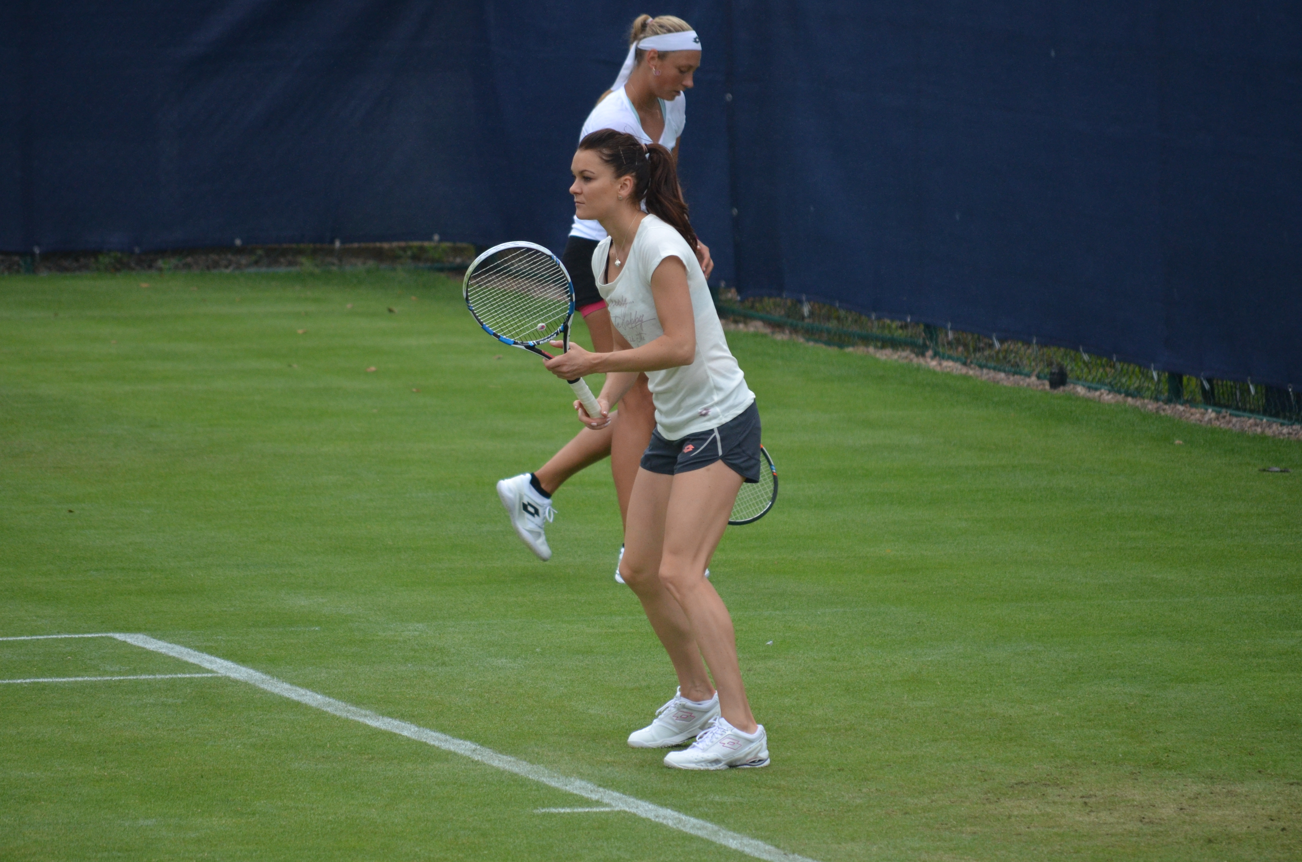 Agnieszka Radwańska